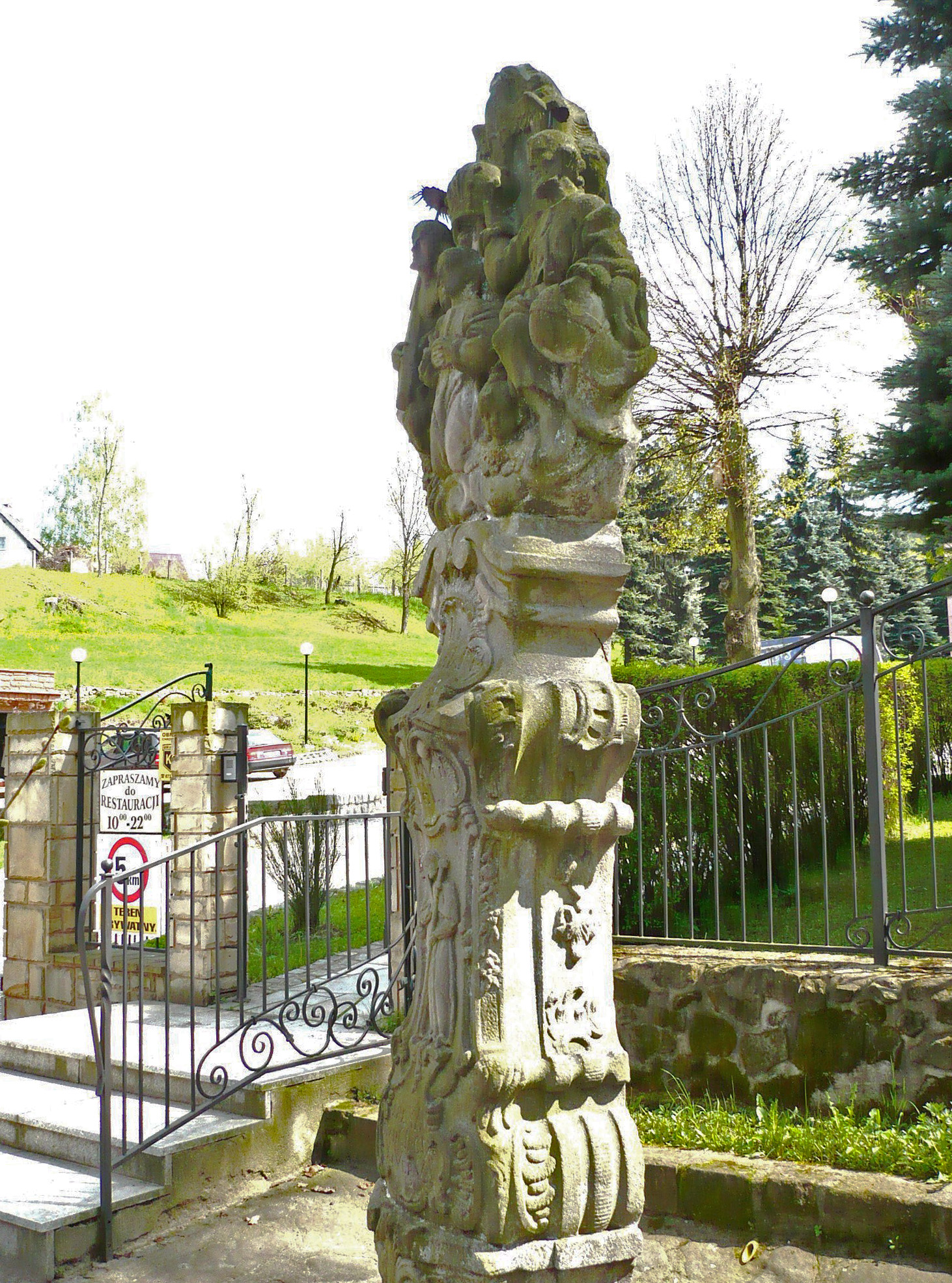 Nowa Ruda, ul. Strzelecka 2 - figura Trójcy Świętej, 1798.